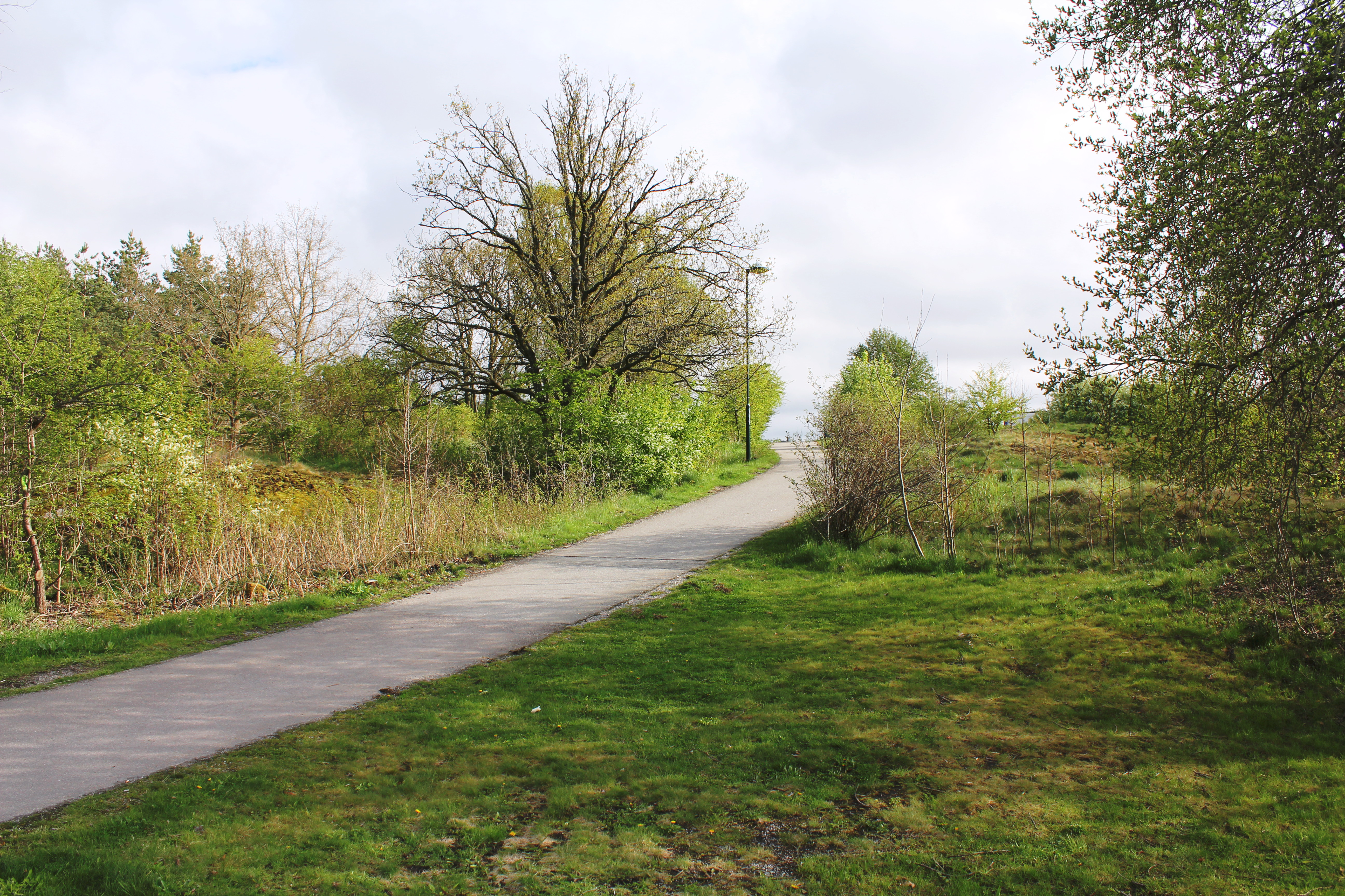 Bägersta bytomt intill Årstafältet.